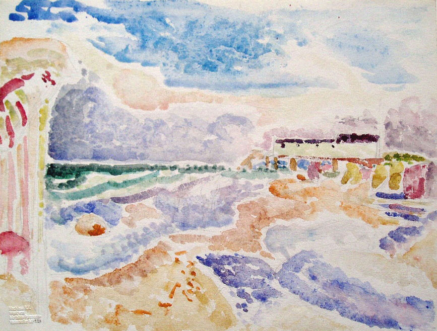 Ostseestrand Bansin, Aquarell auf Büttenpapier, unten links mit Prägestempel und Nachlassnummer 224, 16 x 21 cm